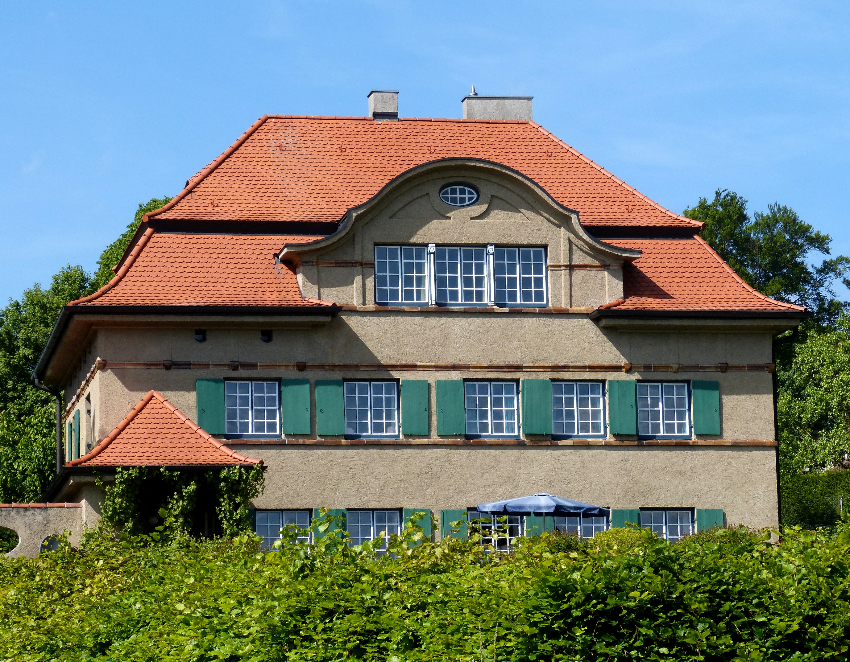 Feldafing, Höhenbergstraße 35, Villa Carl. Der zweigeschossige Mansarddachbau im geometrisierenden Jugendstil mit Schweifgiebel-Zwerchhaus und Klinkerziegel-Gliederungen entstand 1910/11 unter der Leitung von Richard Riemerschmid.